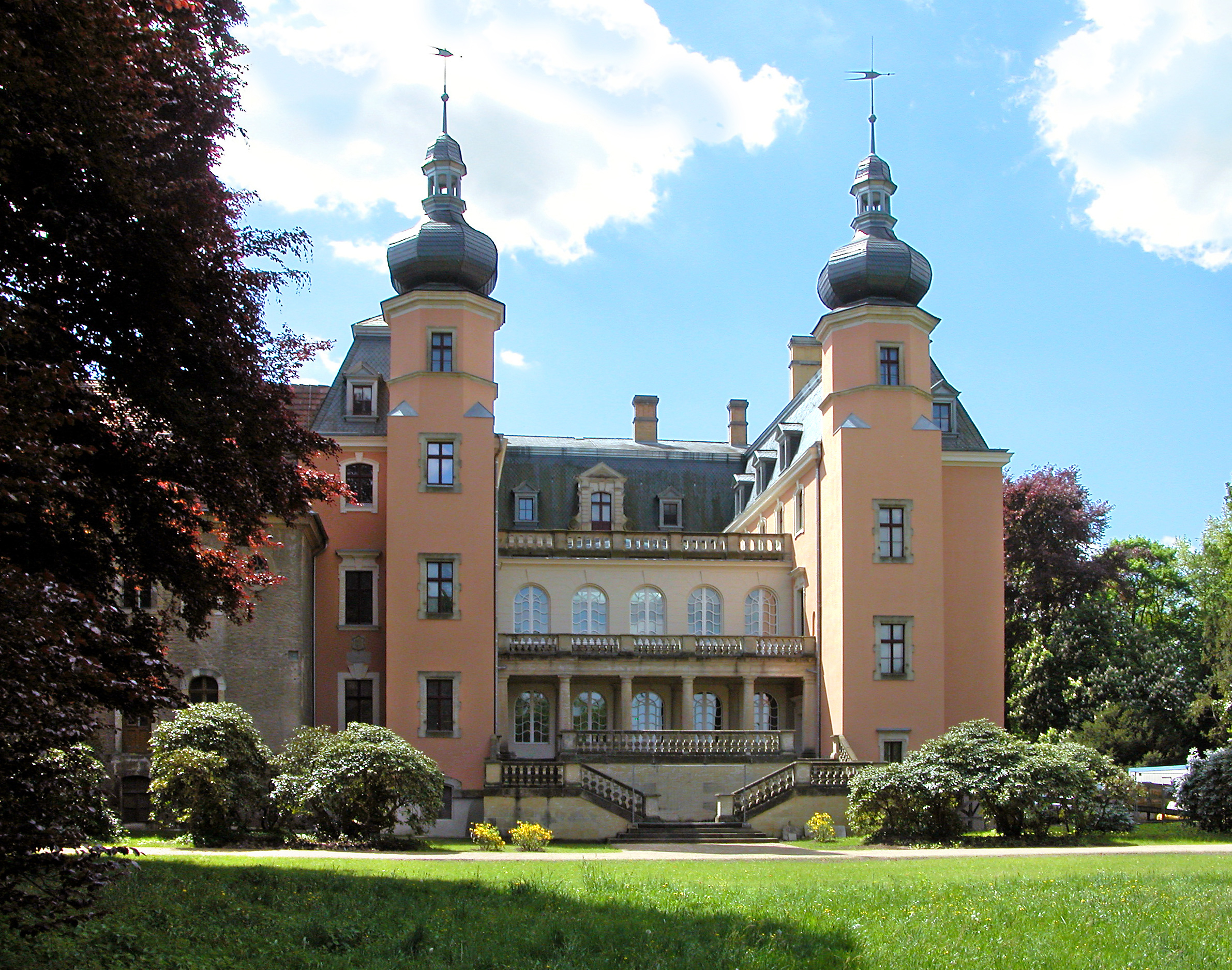 13.05.2015 03229 Altdöbern: Barockschloß (GMP: 51.653714,14.035239) von Norden, Parkseite. Das Schloß geht auf eine frühdeutsche Wasserburg zurück. 1712 erwarb Alexander Dietrich von Eickstedt den Besitz, ließ er den Vorgängerbau niederreißen und ab 1717 das heutige Schloss im barocken Stil errichten. Bis 1750 ließ der neue Besitzer, Carl Heinrich von Heineken, die Anlage prunkvoll ausbauen, den Garten erheblich vergrößern und mit Kanälen, asserbecken, Springbrunnen, Brücken, Pavillons und kostbaren Sandsteinplastiken ausstatten. In den Jahren 1880 - 83 erhielt die Gesamtanlage ihr endgültiges Gesicht. Nach dem Krieg ging das Anwesen in die Rechtsträgerschaft der Gemeinde Altdöbern über, die das Schloß 1946 dem Caritas-Verband vermietete. Dieser nutzte es zunächst als Waisenhaus u. danach in der DDR bis 1974 als Kinder- und Altenheim. Das Schloß befindet sich seit 1996 im Eigentum der Brandenburgischen Schlösser GmbH. [DSCN5557.JPG]20150513110DR.JPG(c)Blobelt